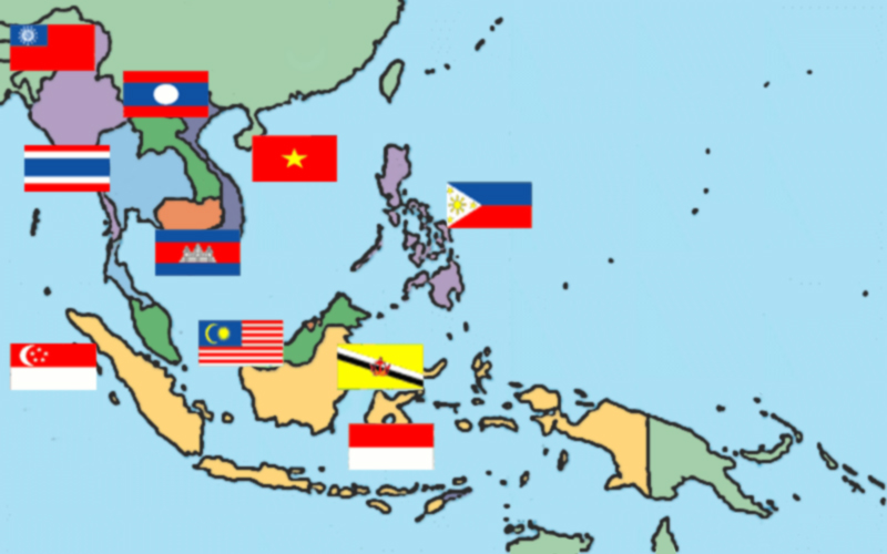 Asia